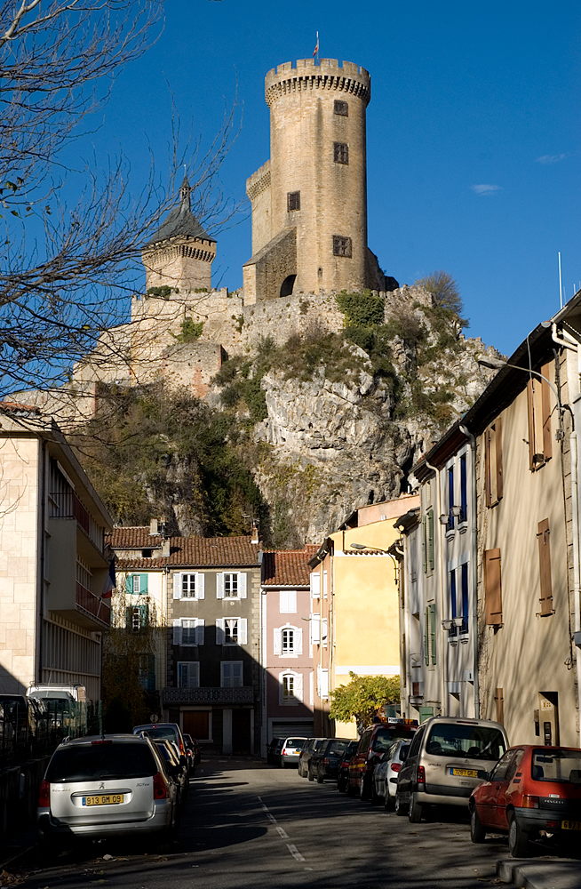 Chateau von Foix